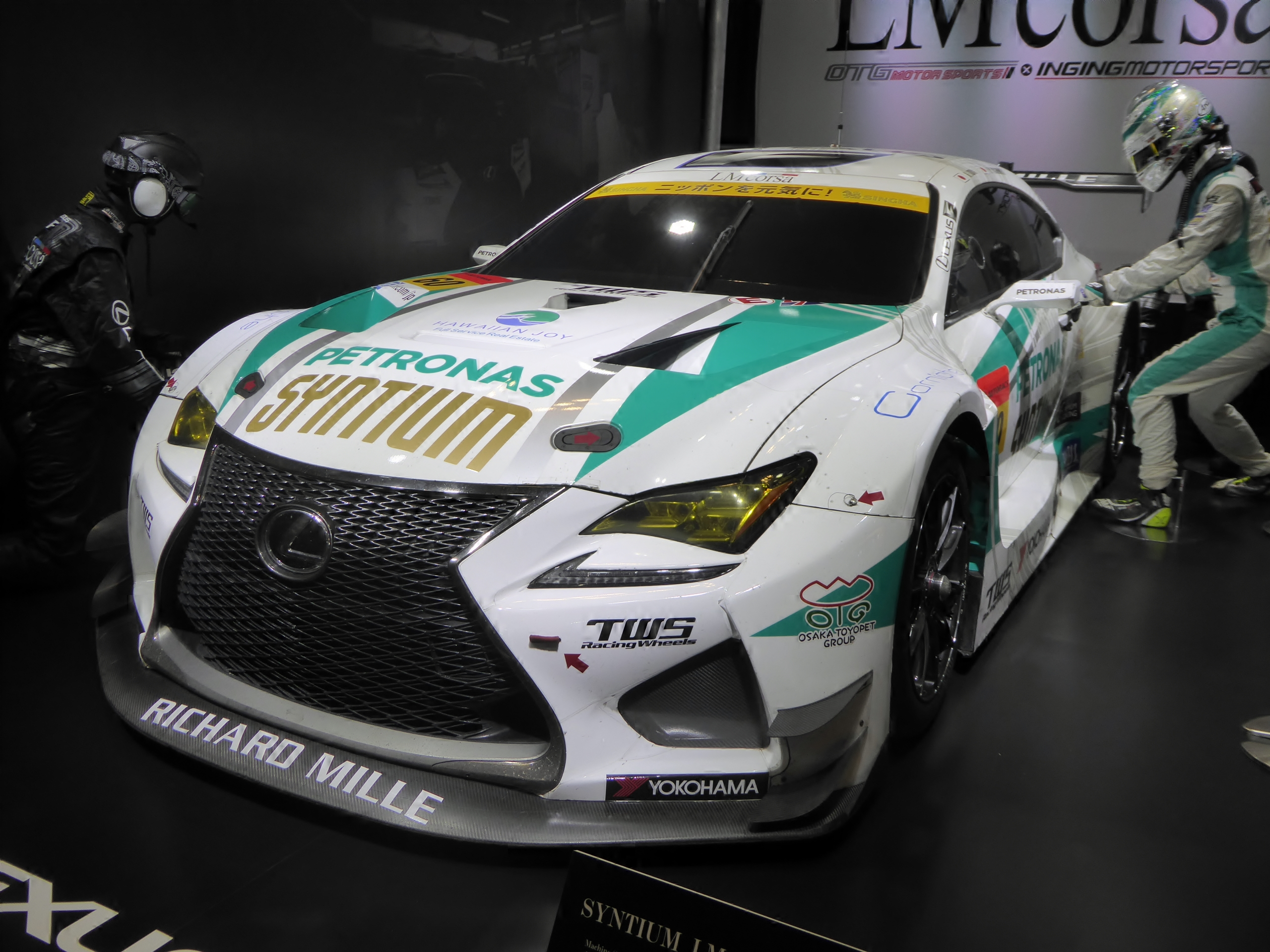 大阪オートメッセ2016において60号車SYNTIUM LM corsa RC Fを撮影。